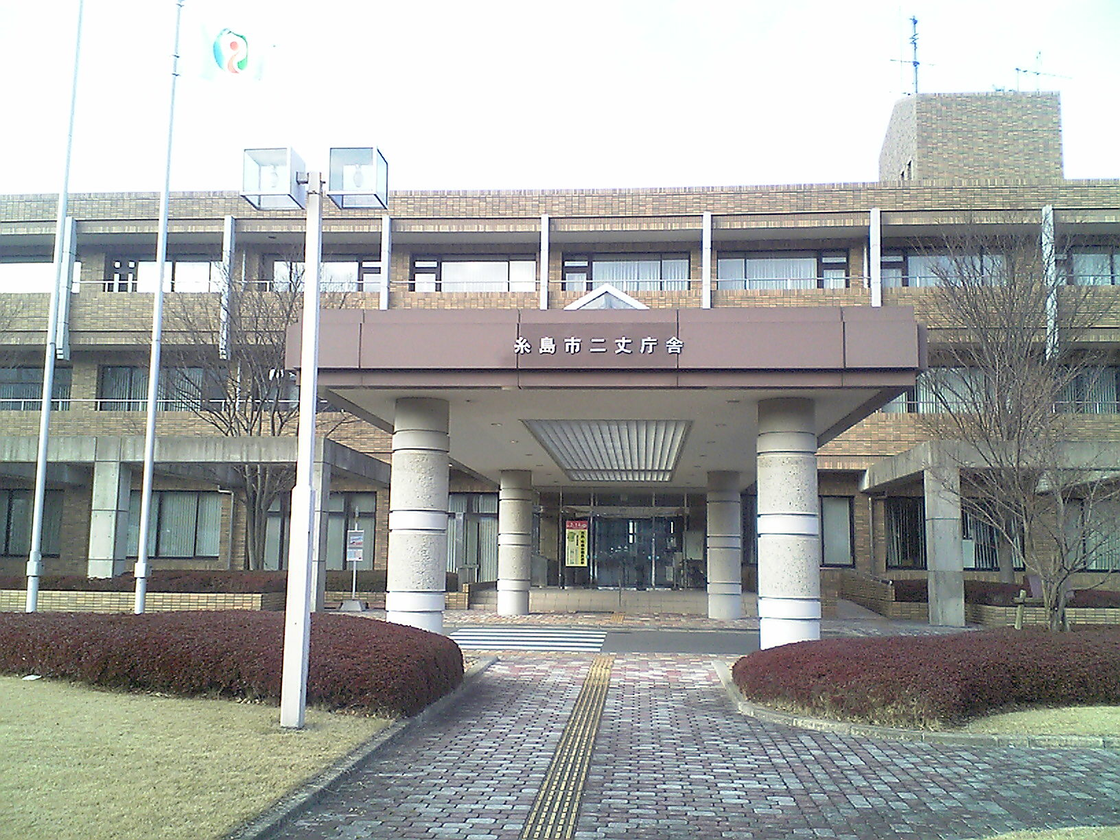 糸島市役所二丈支所 （福岡県糸島市/旧：二丈町役場）